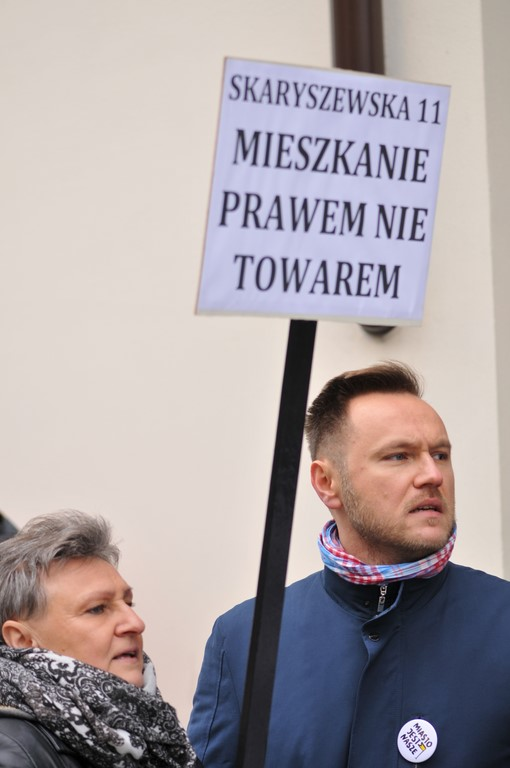 Ewa Małgorzata Pawlak oraz Przemysław Pawlak na pikiecie ws. Skaryszewskiej 11